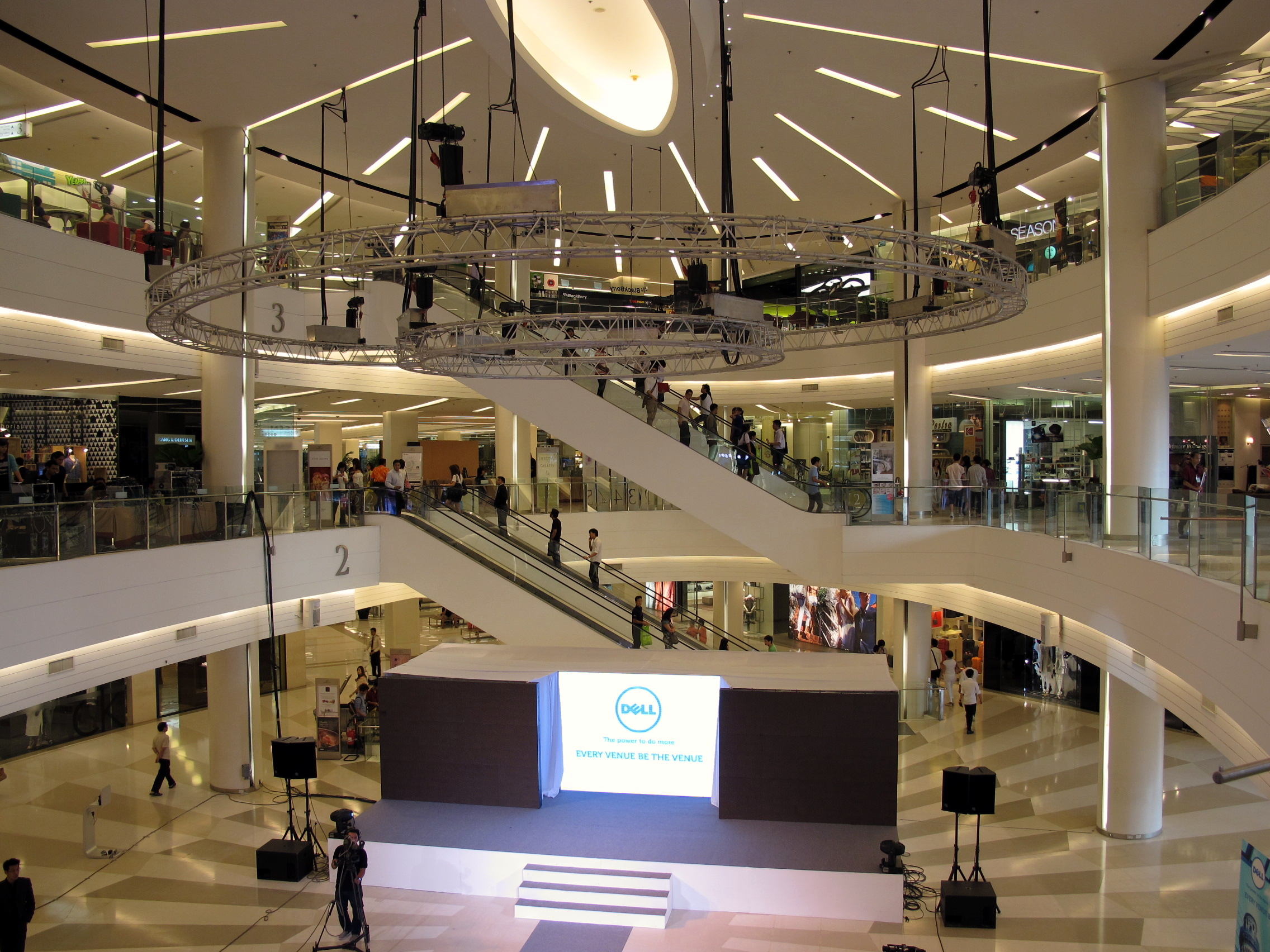 Siam Paragon Main Void